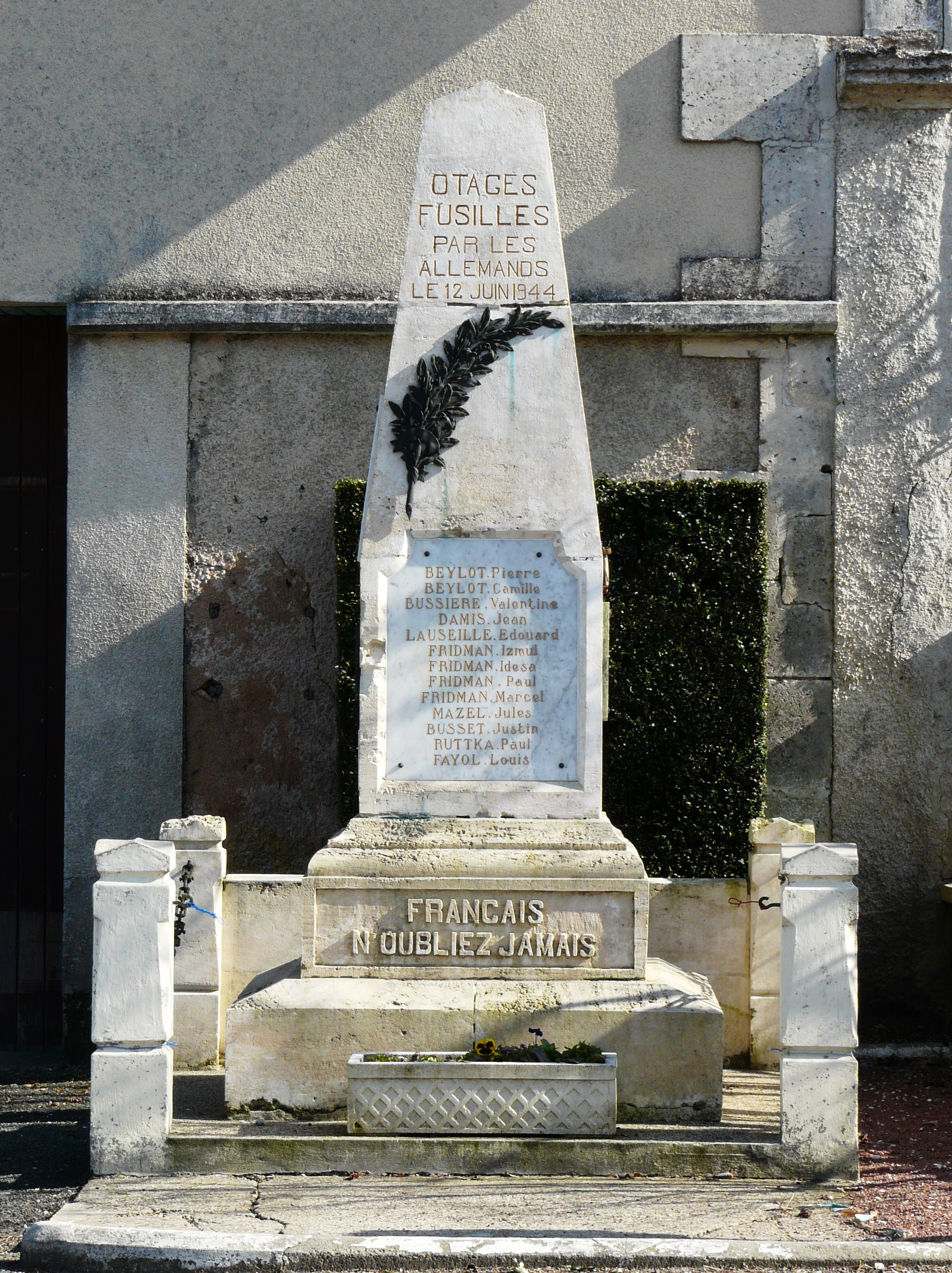 Stèle en mémoire des otages fusillés le 12 juin 1944 par les Allemands au lieu-dit les Piles, Antonne-et-Trigonant, Dordogne, France